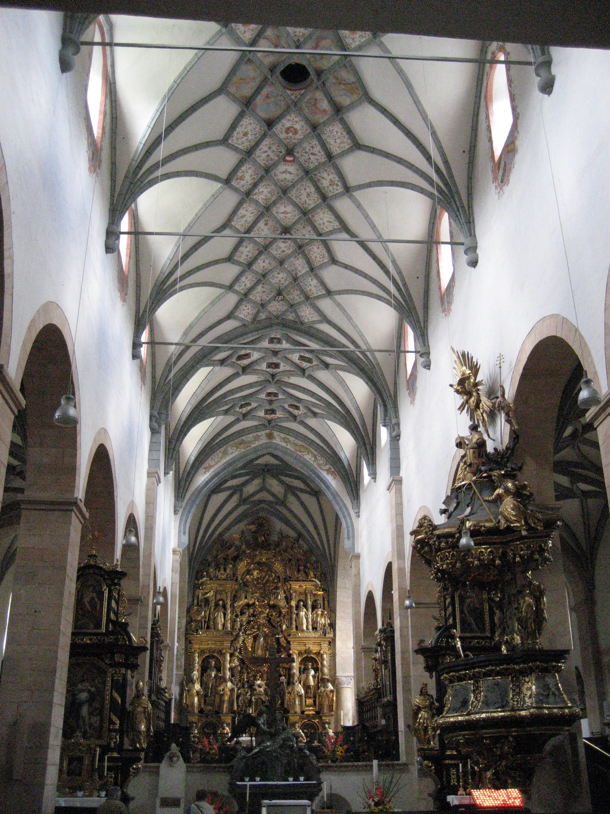 Dom zu Gurk (Kärnten, Österreich): Langhaus mit spätgotischem Gewölbe, Gurk Cathedral (Carinthia, Austria)